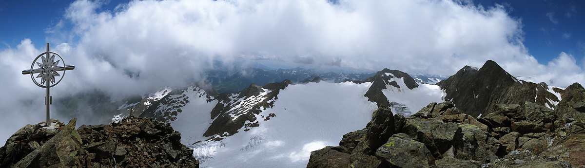 Gipfelblick von der Schneespitze auf den Feuersteinferner, die Aglsspitze, den Westlichen, sowie den Östlichen Feuerstein